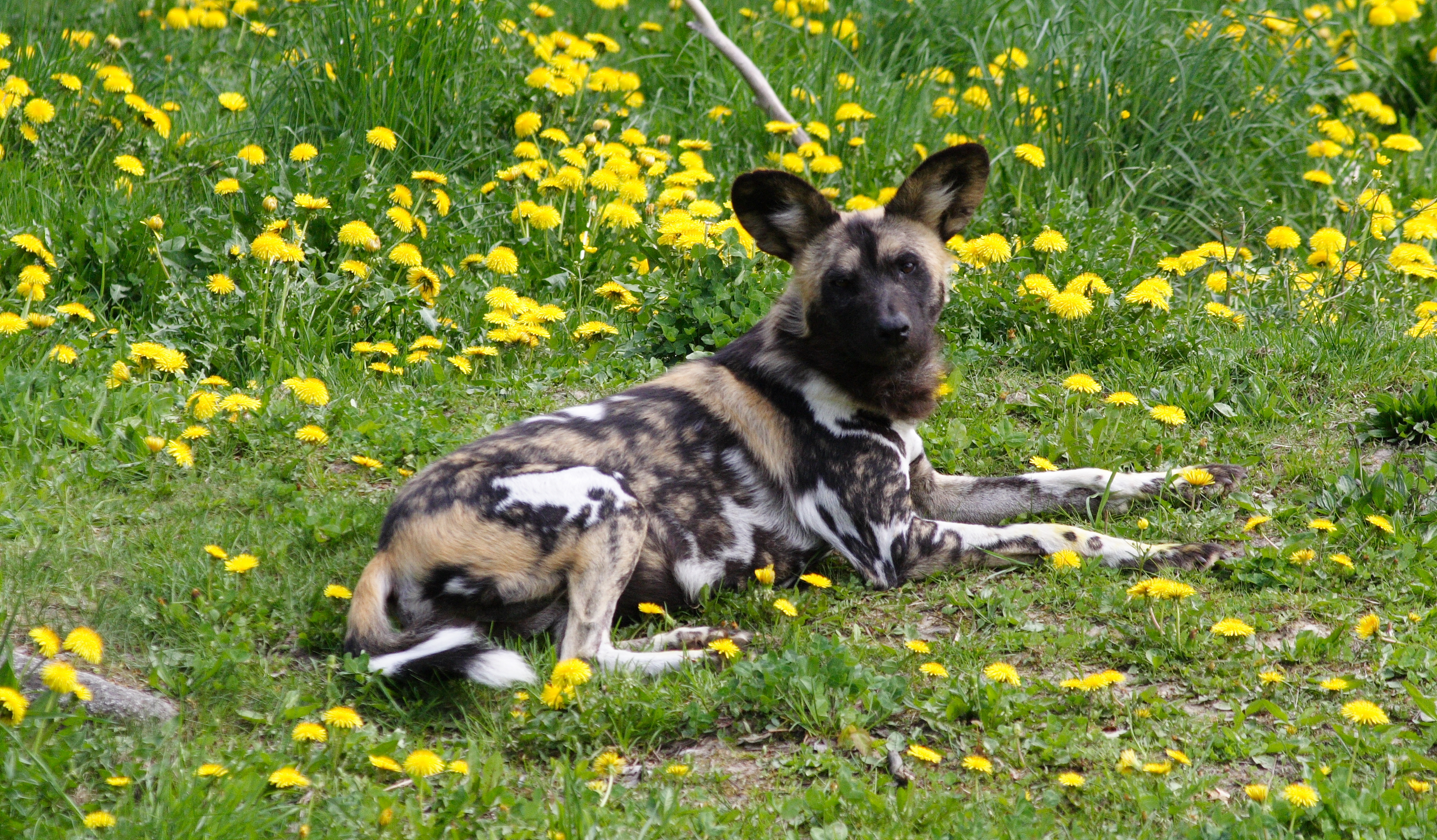 Eigene Aufnahmen, zuerst veröffentlicht hier: Afrikanischer Wildhund, Tierpark Hellabrunn